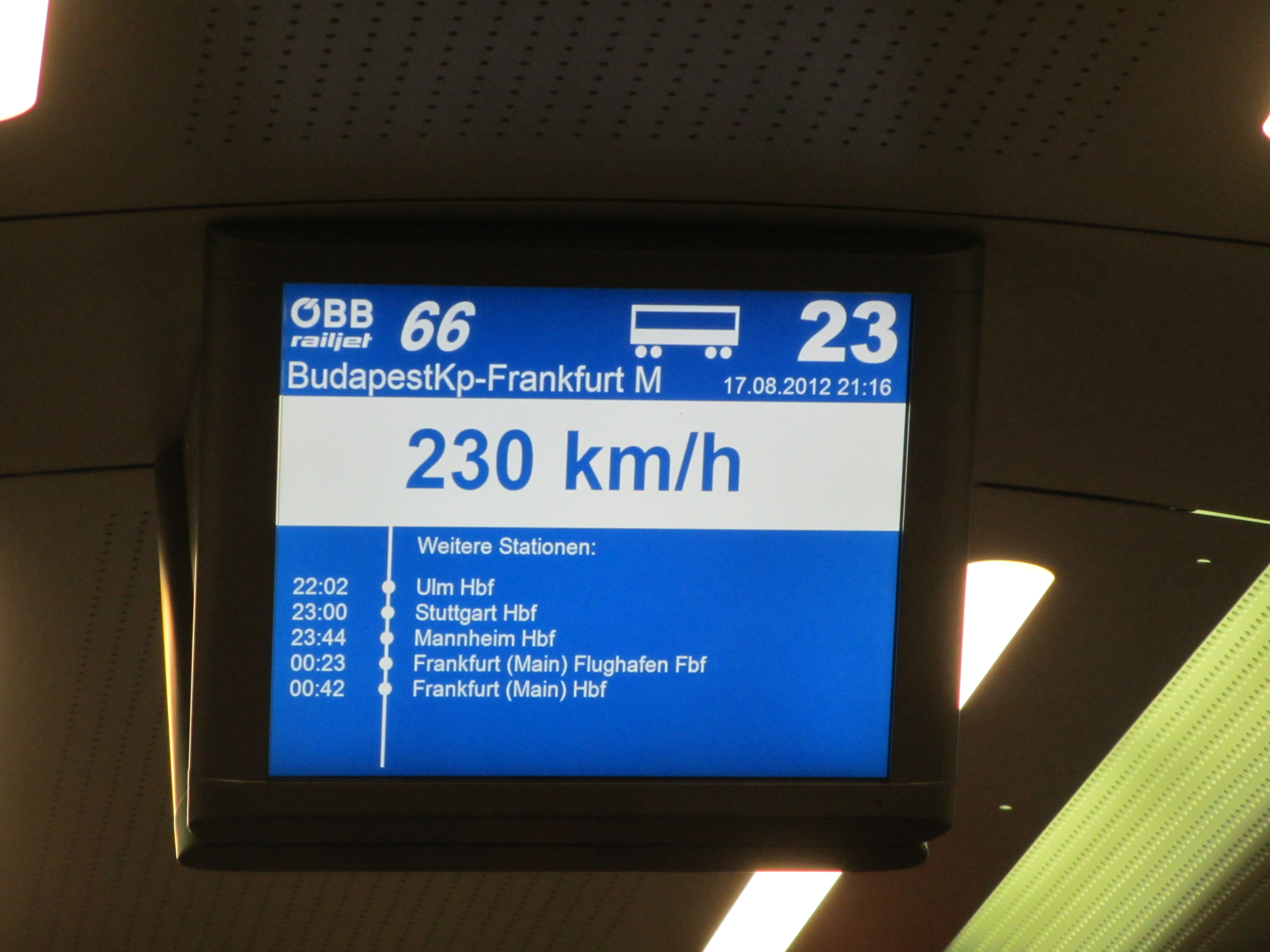 Fahrgastinformation System RJ 230 km/h